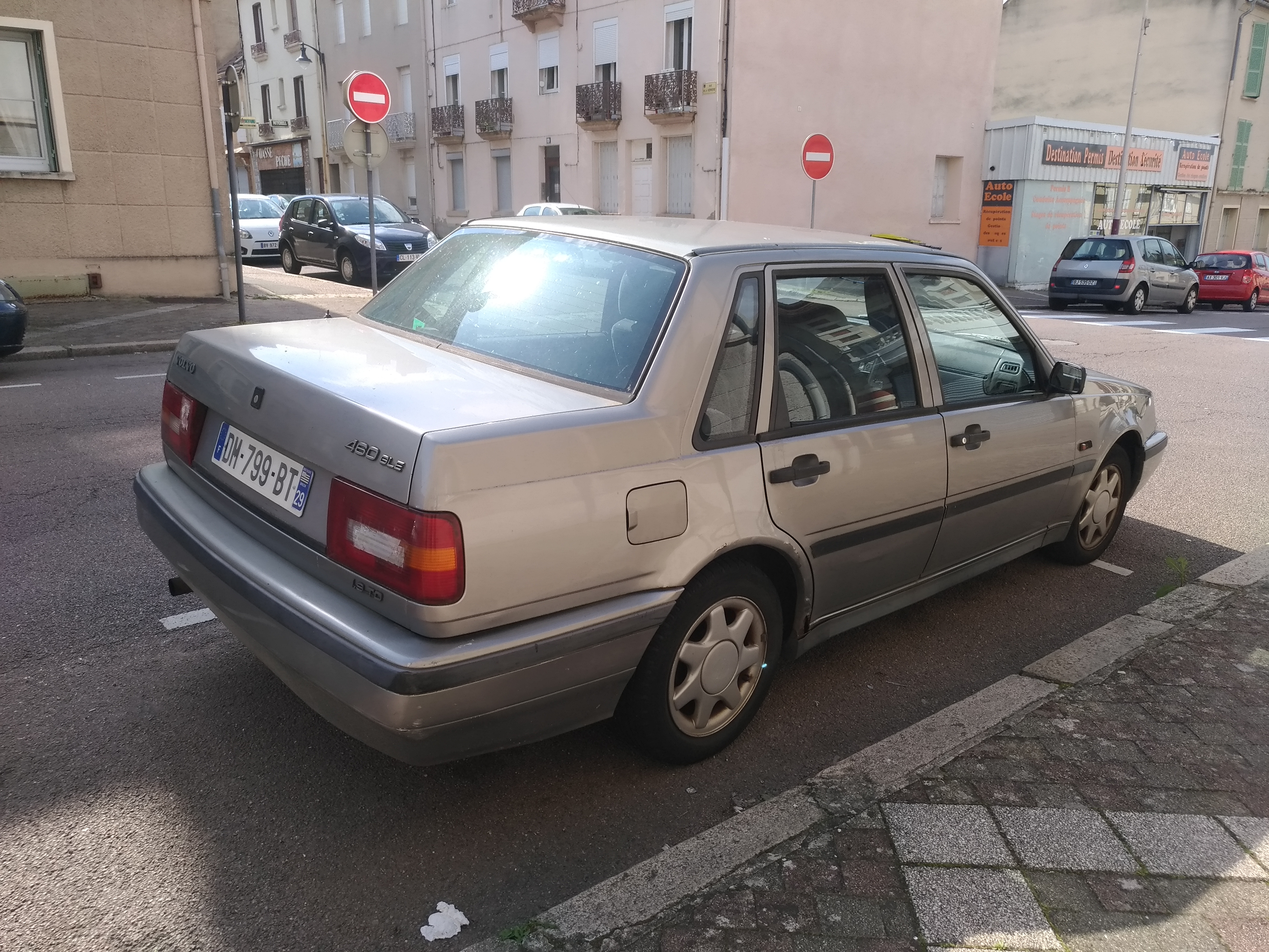 1994 Volvo 460 gle (1.8 90 hp) at Le Creusot